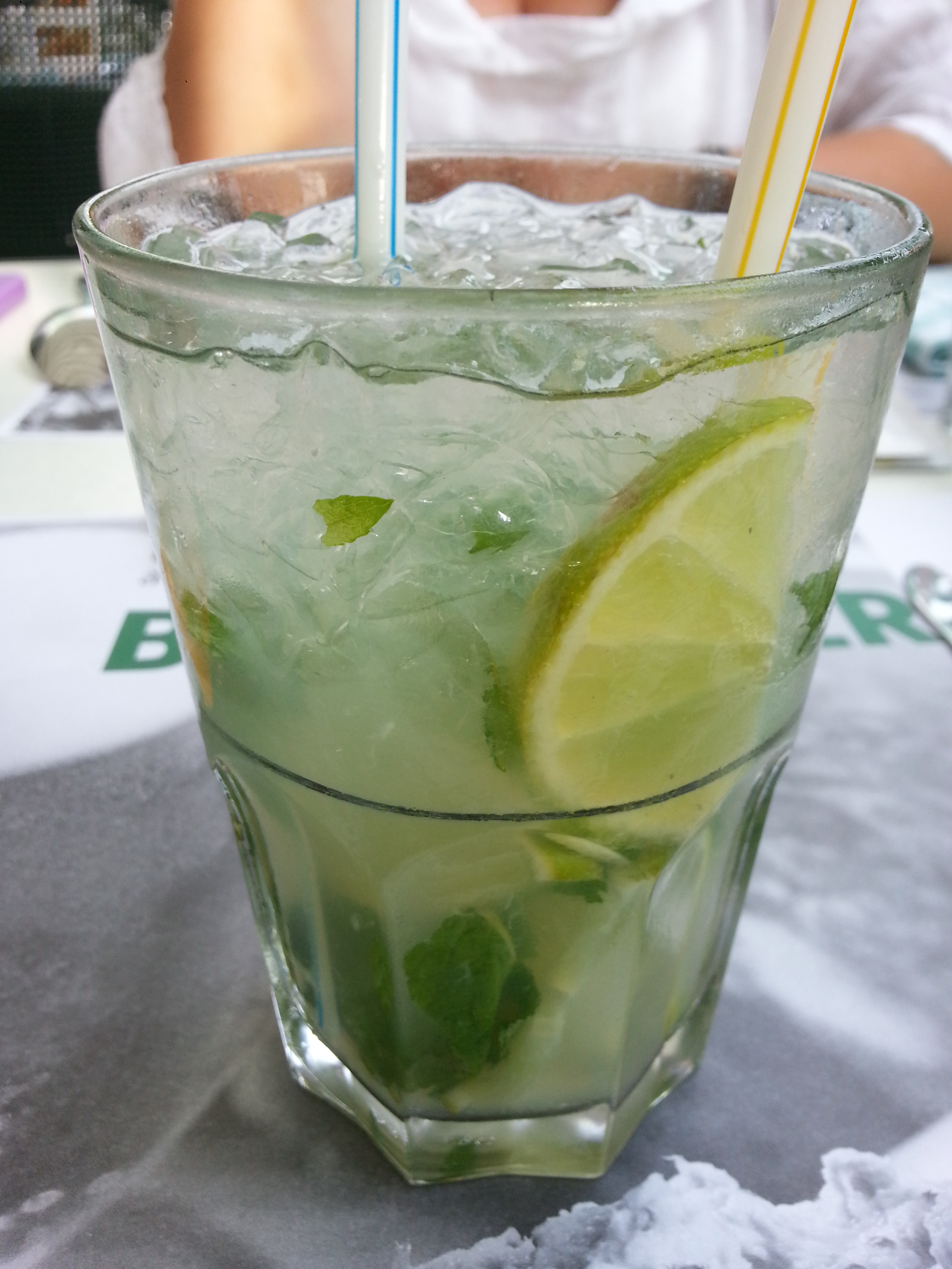 Mojito